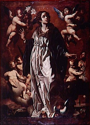 L'Immaculée Conception